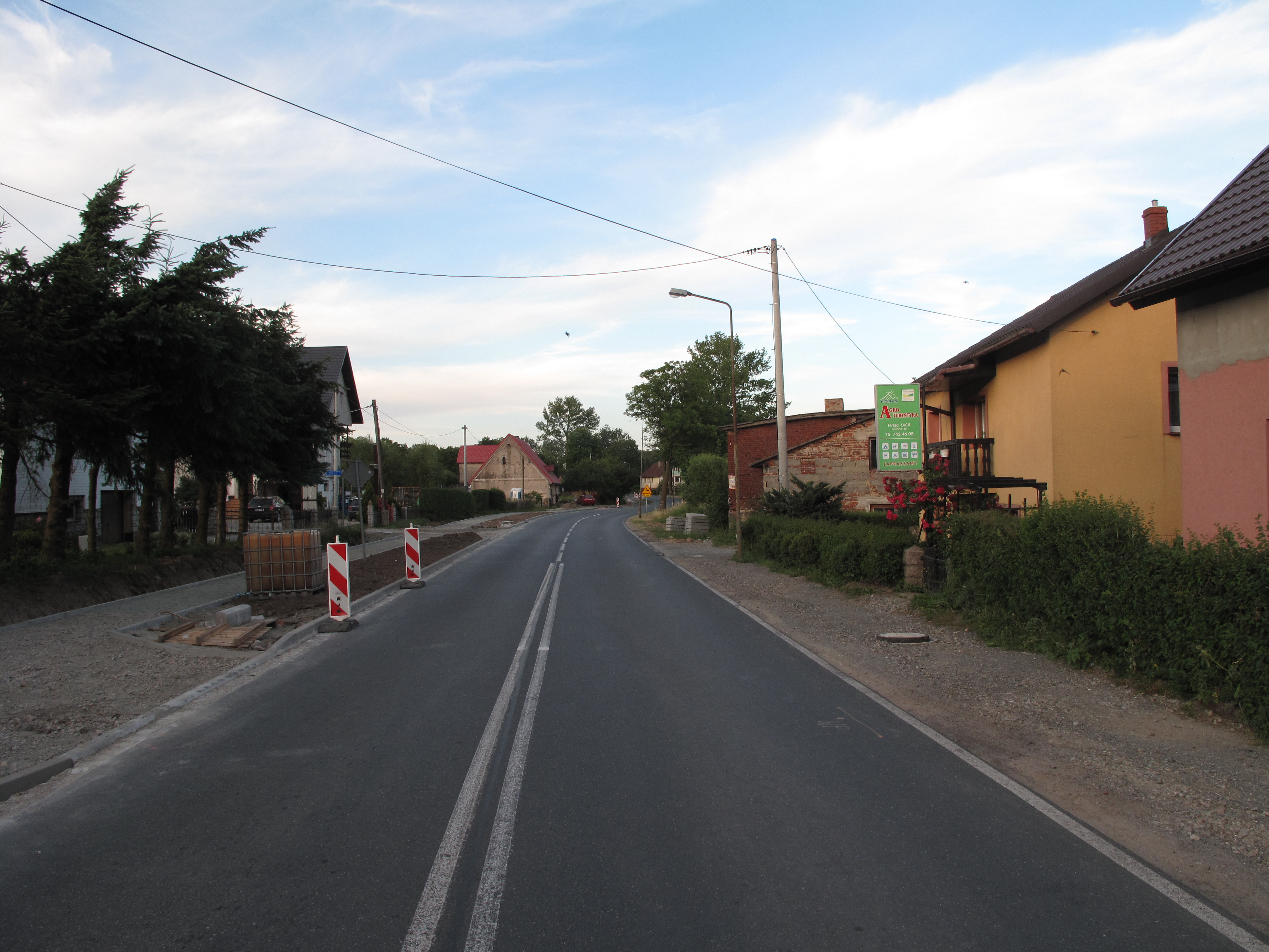 Szarocin. Polska